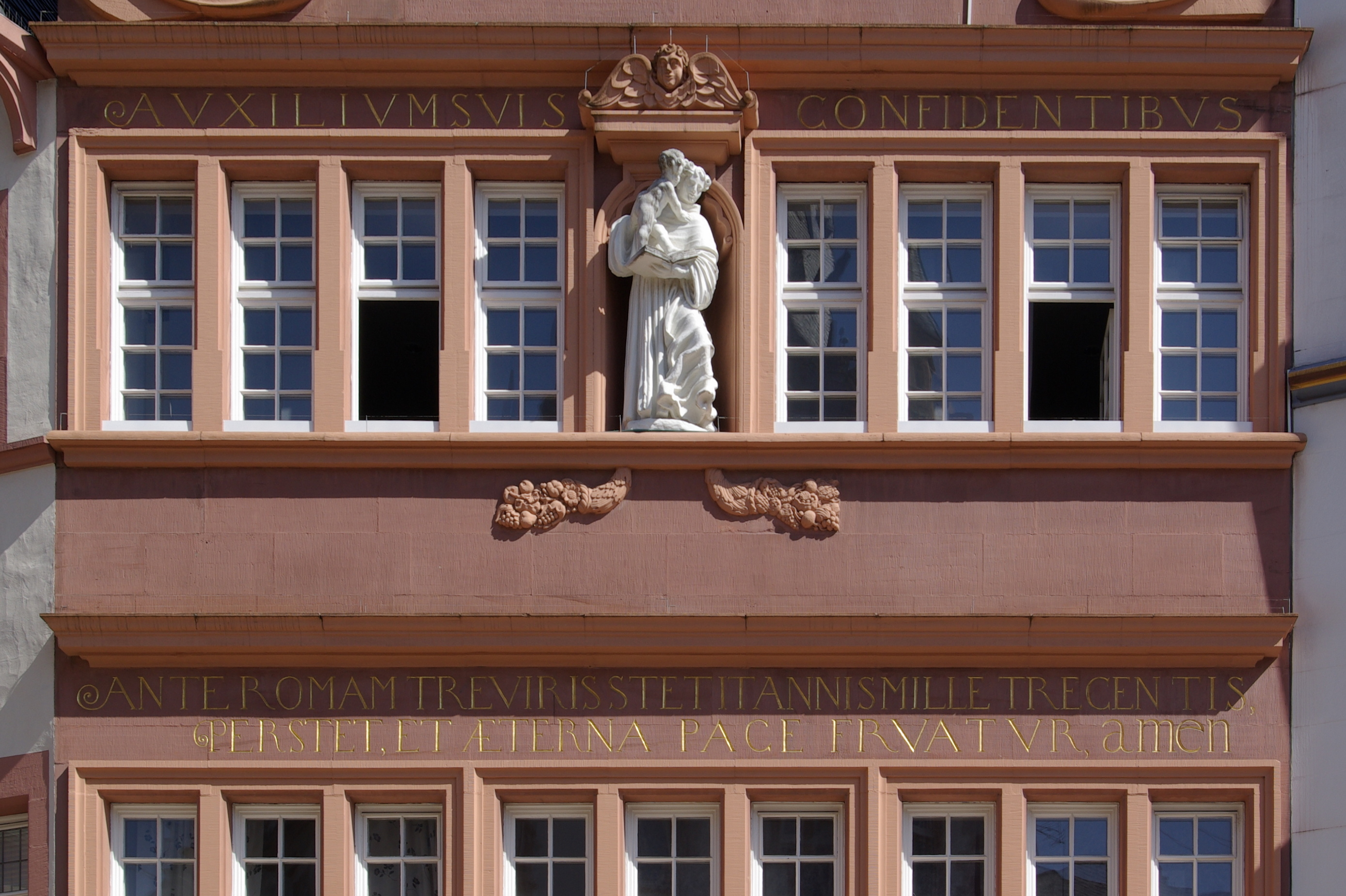 Trier, "Rotes Haus", erbaut im Jahre 1684 von dem Baumeister Wolfgang Stuppeler im Auftrag von Johann Wilhelm Polch. Die untere Inschrift lautet: "ANTE ROMAN TREVIRIS STETIT ANNIS MILLE TRECENTIS PERSTET ET ÆTERNA PACE FRUATUR" (Vor Rom stand Trier eintausend und dreihundert Jahre. Möge es weiter bestehen und sich eines ewigen Friedens erfreuen.) Die Figur zeigt den Hl. Anonius von Padua, die Inschrift darüber lautet: "AUXILIUM SUIS CONFIDENTIBUS" (Er (Antonius) gibt Hilfe denen, die auf ihn vertrauen)